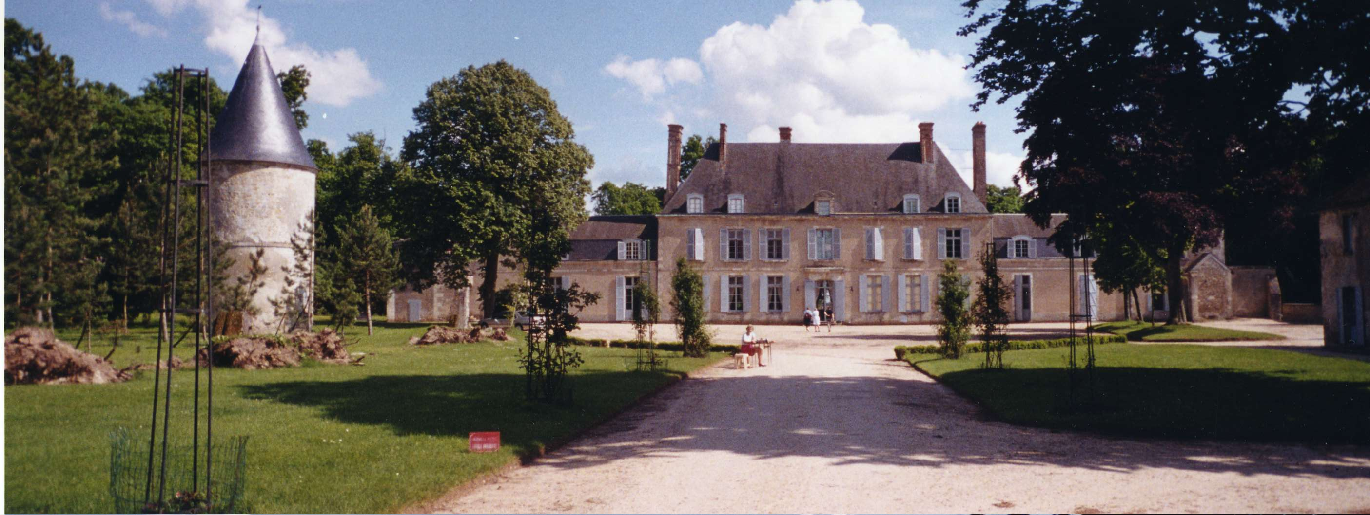 Château de Denainvilliers, Dadonville, Loiret